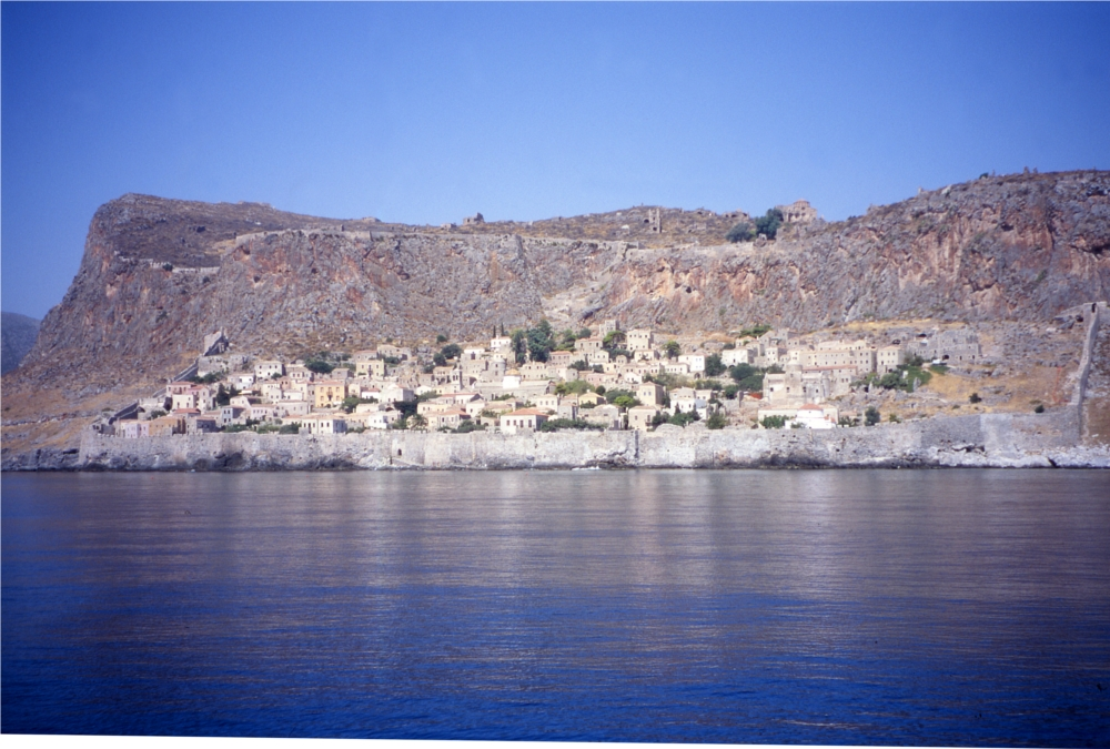 Monemvasia 2003